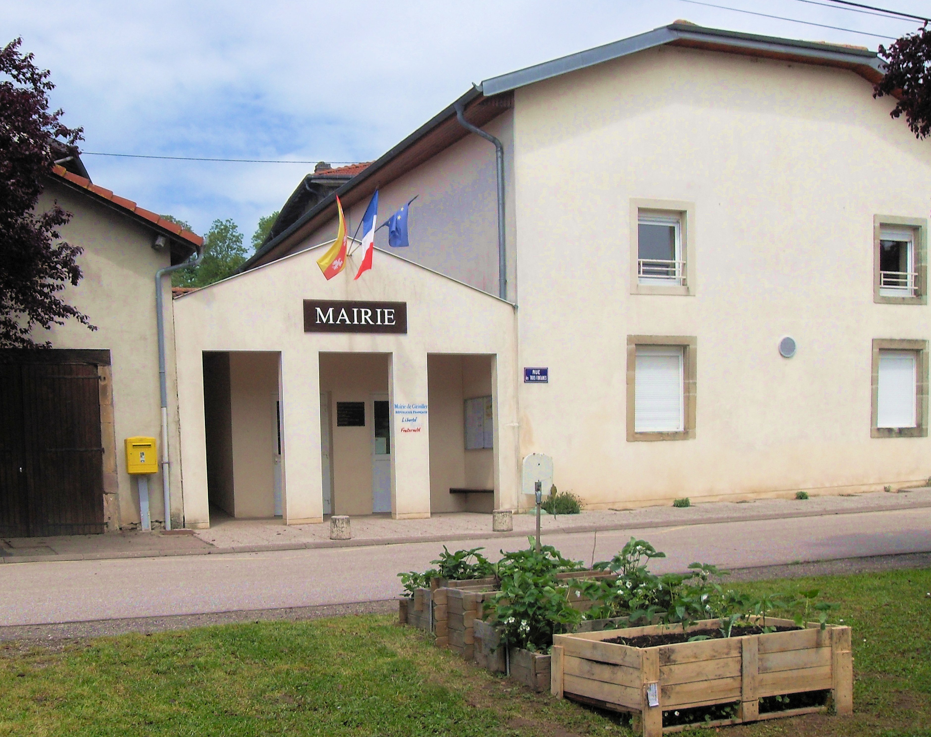 La mairie de Giriviller